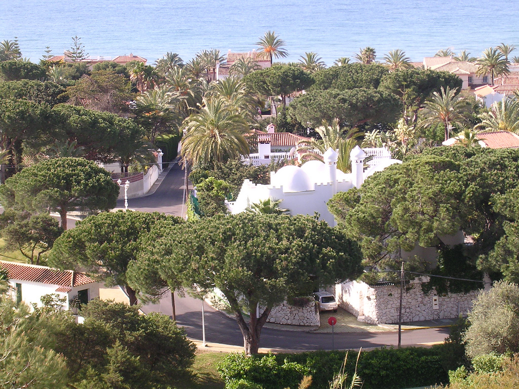 Urbanización Marbesa, Marbella, Málaga, España